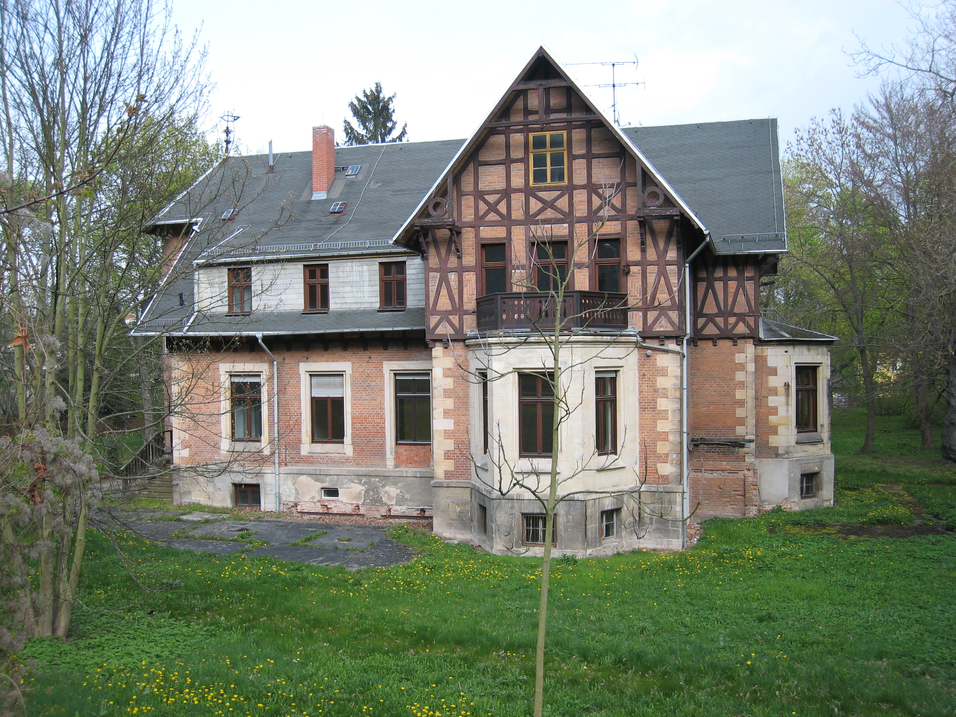 Villa Franz an der Plaueschen Straße 4, Arnstadt